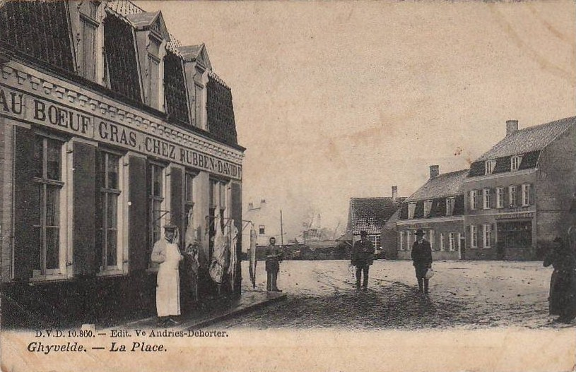 La Boucherie Au Boeuf Gras à Ghyvelde.